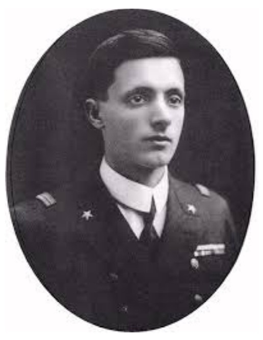 SIlla Giuseppe Fortunato a soli 24 anni nel 1924